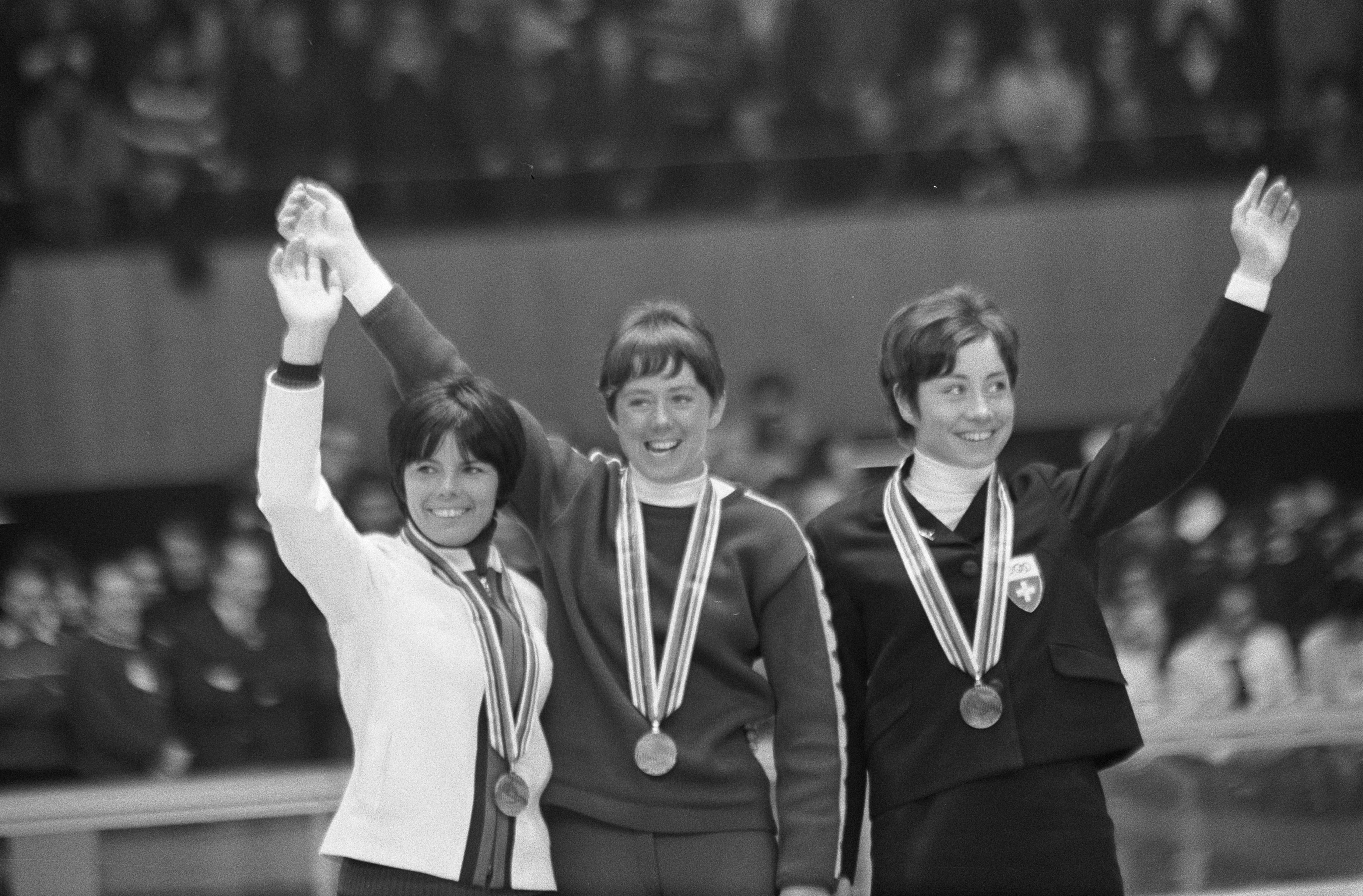 Collectie / Archief : Fotocollectie Anefo Reportage / Serie : [ onbekend ] Beschrijving : Olympische Spelen Grenoble, Ceremonie Protocolair reuzenslalom dames (ski), v.l.n.r. Annie Famose (Frankrijk, 2e), Nancy Green (Canada, 1e), Fernande Bochatay (Zwitserland, 3e) Datum : 13 februari 1968 Locatie : Frankrijk, Grenoble Trefwoorden : skien, sport Persoonsnaam : Bochatay Fernande, Famose Annie, Green Nancy Fotograaf : Kroon, Ron / Anefo Auteursrechthebbende : Nationaal Archief Materiaalsoort : Negatief (zwart/wit) Nummer archiefinventaris : bekijk toegang 2.24.01.05 Bestanddeelnummer : 921-0894